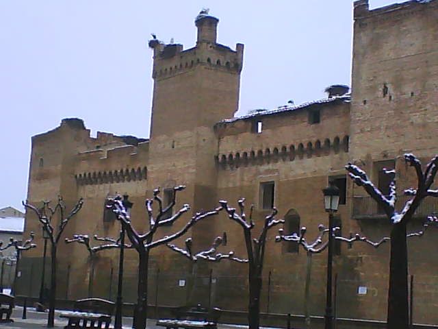 Castillo de Marcilla, antes de la restauración.